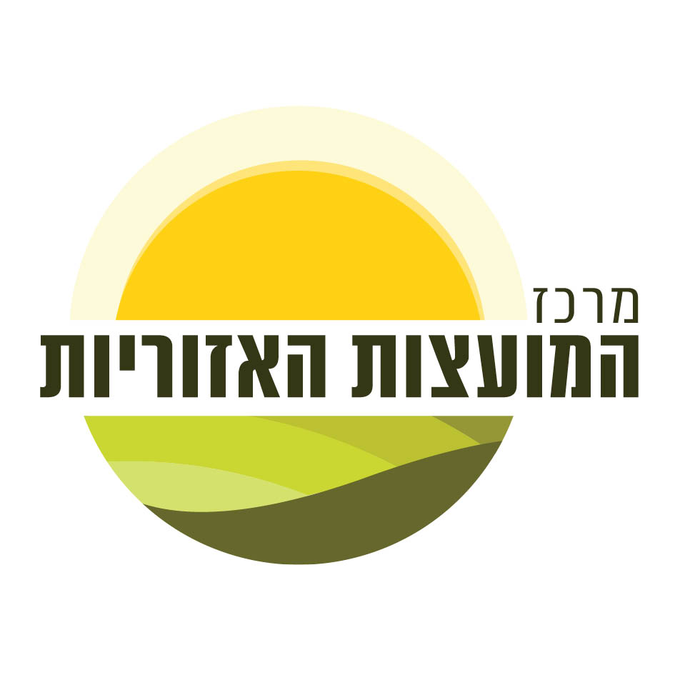 לוגו מרכז המועצות האזוריות